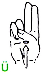 Der Buchstabe 'Ü' im deutschen Fingeralphabet, entsprechend einer Infokarte des Landesverbandes Bayern der Gehörlosen e.V. (